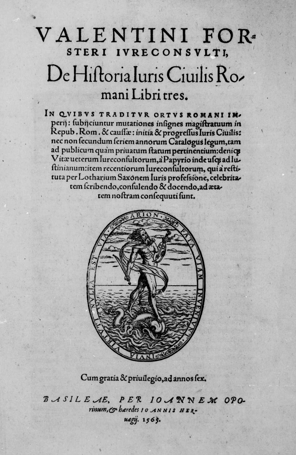 Frontespizio